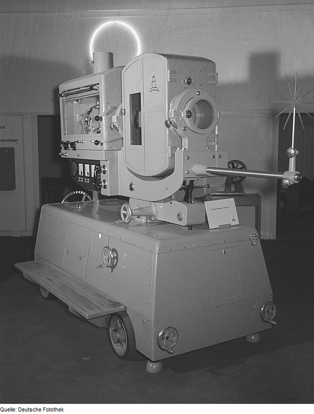 Original image description from the Deutsche Fotothek Rückprojektionsanlage des VEB Zeiss Ikon Dresden